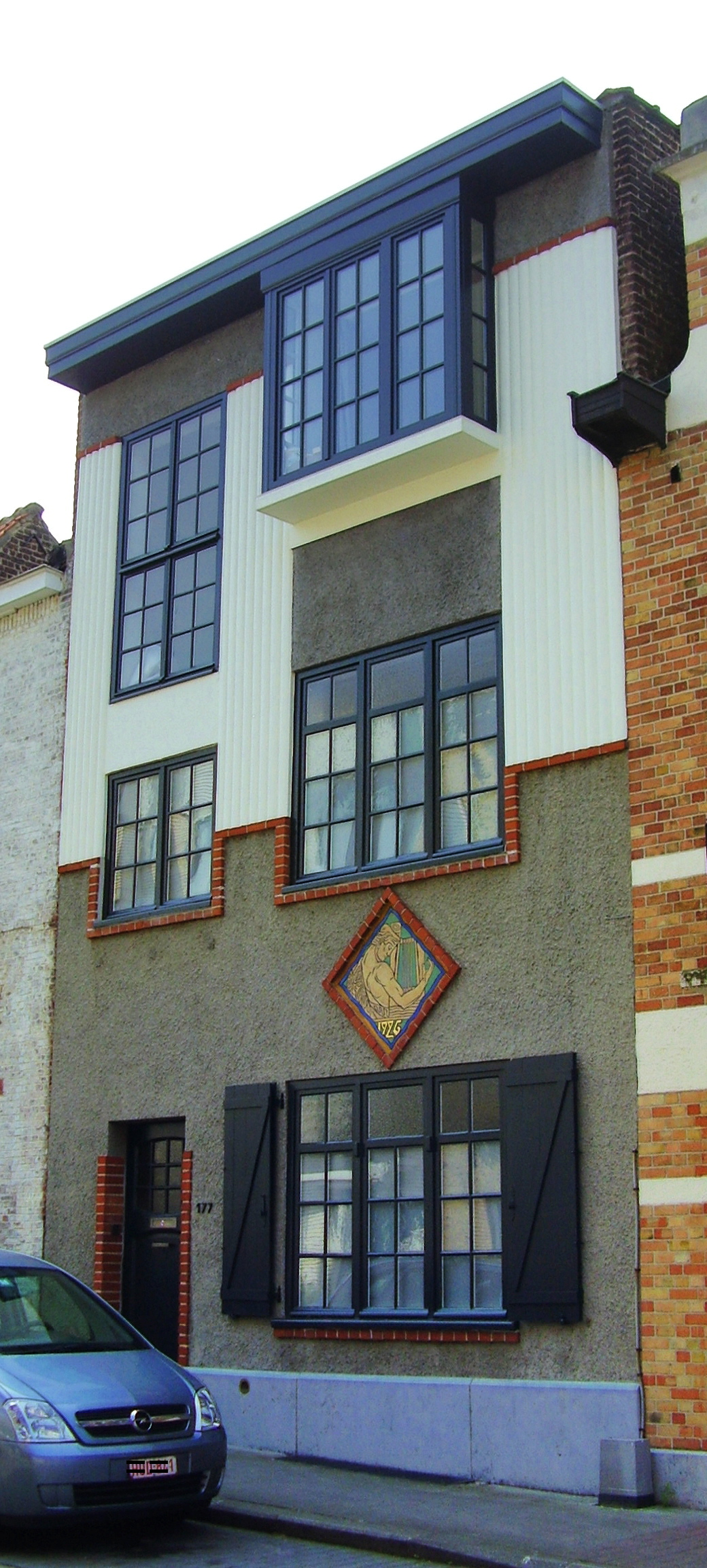 Description: Maison particulière, architecte Paul Cauchie, 1926 - Woluwe-Saint-Pierre (Bruxelles) Author: User:Ben2 Date of creation: 30 juin 2006 Source: Photo personnelle